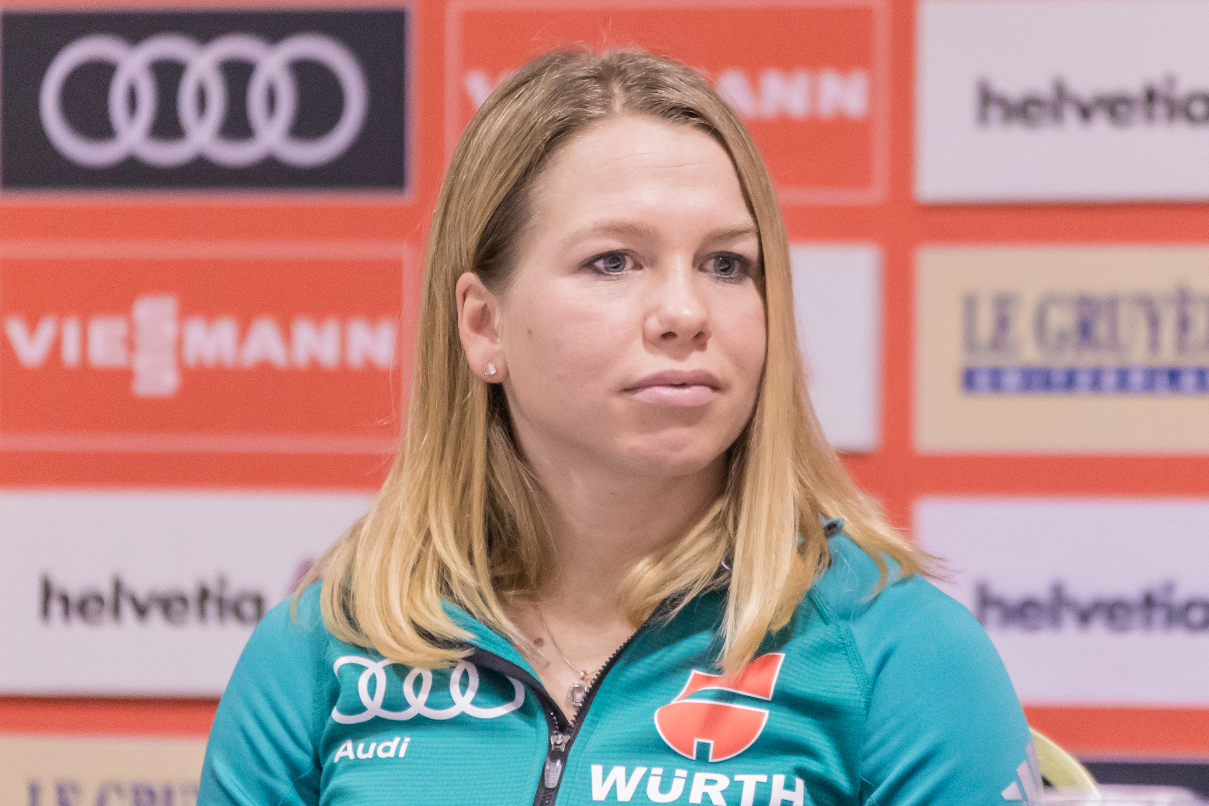 Sandra Ringwald; Porträt, Einzelbild; Pressekonferenz